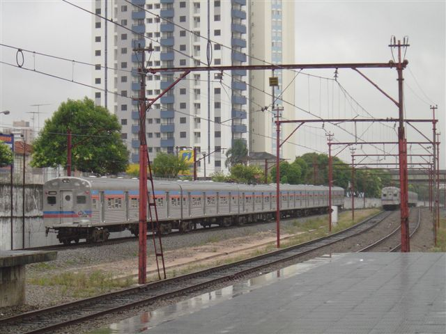 Trem 1400 CPTM - Linha 12